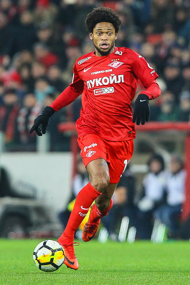 «Спартак» обыграл «Зенит» в дерби двух столиц